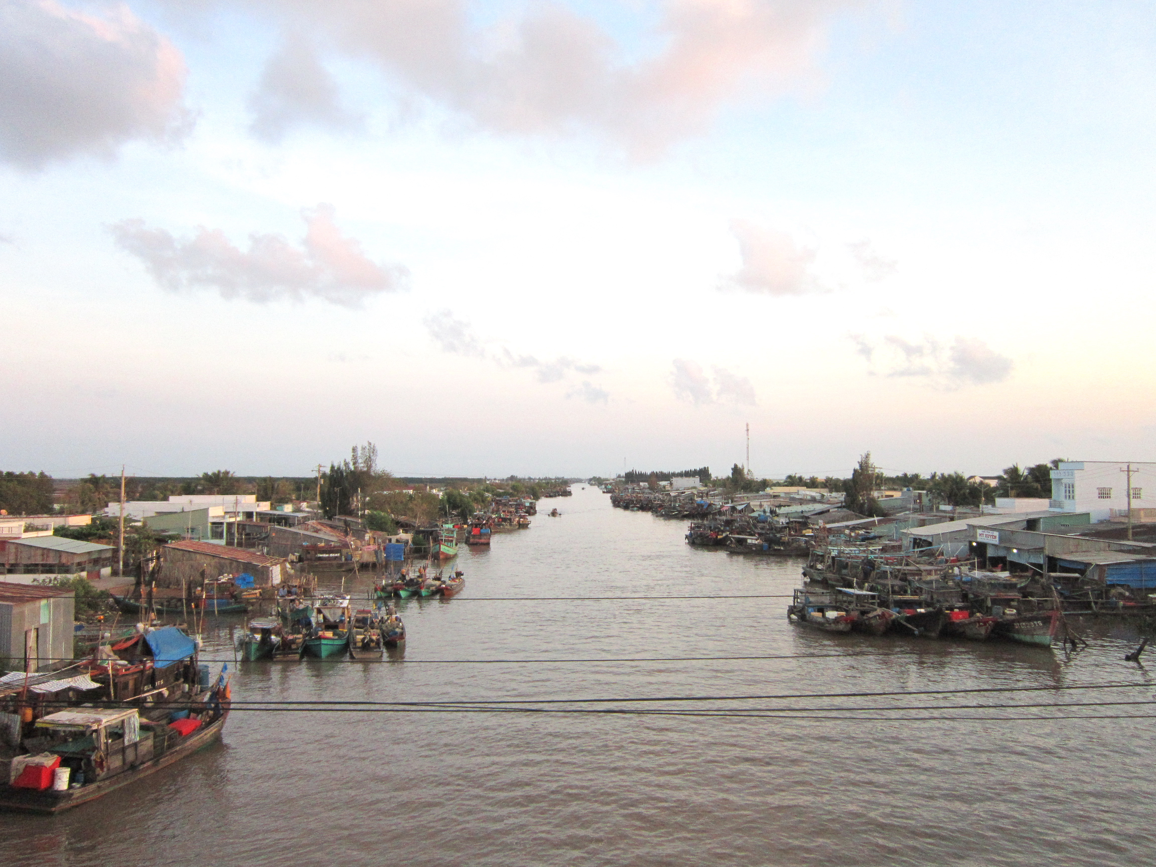 Kênh Nhà Mát ở thành phố Bạc Liêu (Việt Nam)